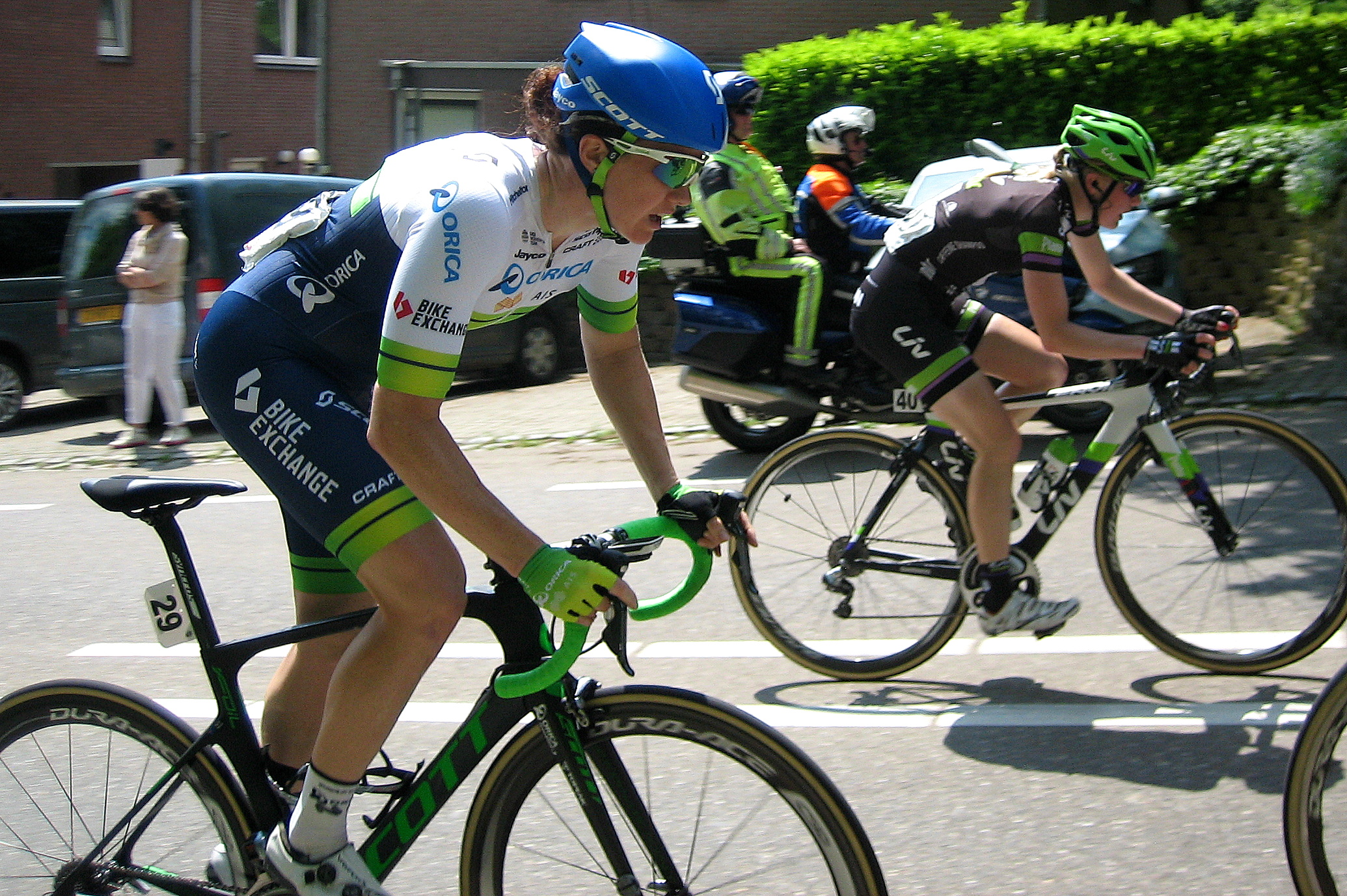 Sarah Roy (Orica-AIS) & Rozanne Slik (Liv-Plantur) in Holland Hills Classic 2016